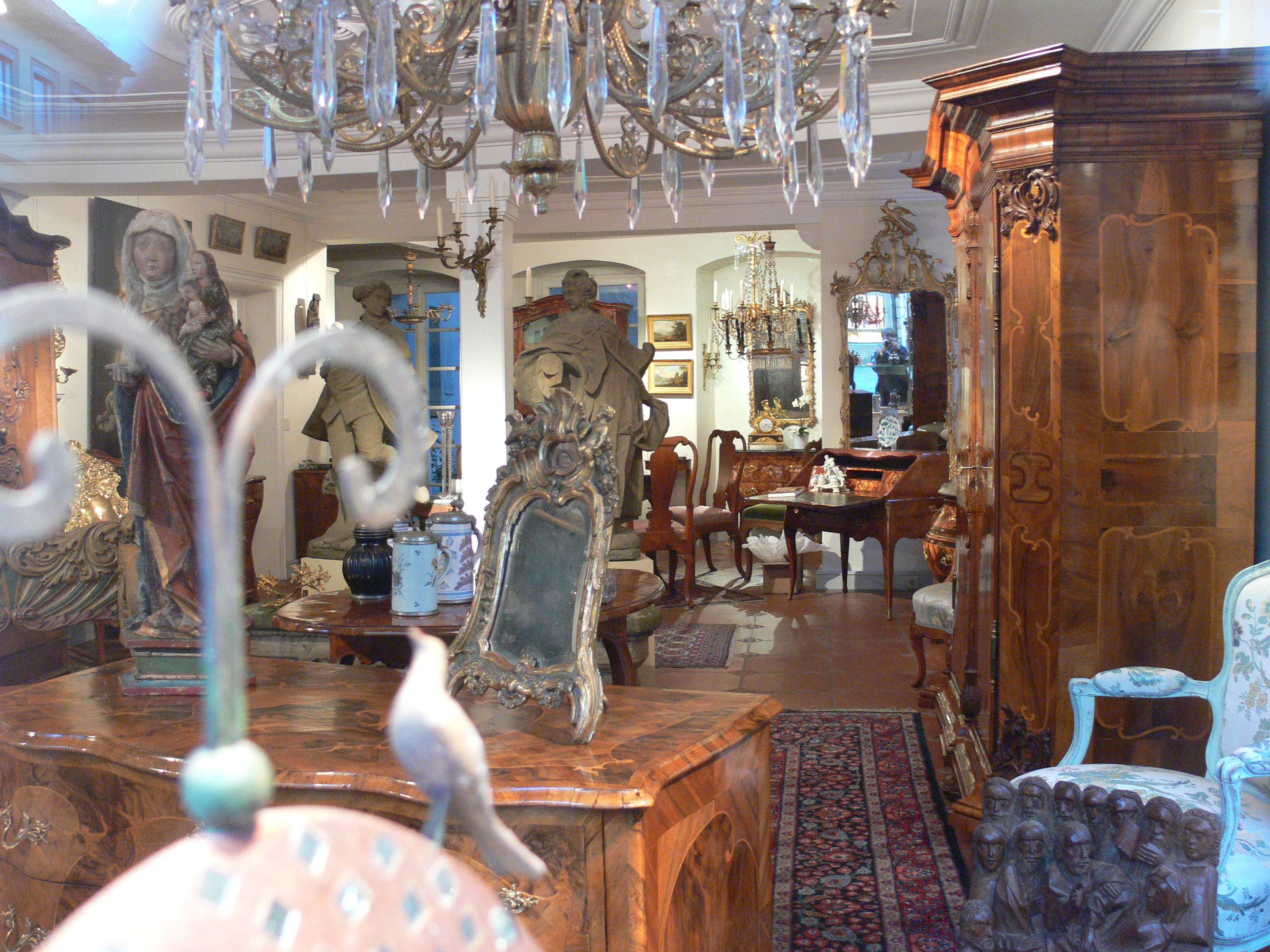 Bamberg Blick in ein Antiquitätengeschäft